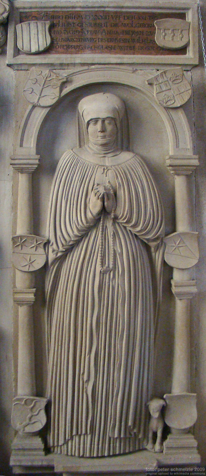 Grabmal der Anna Barbara von Neipperg in der Stadtkirche Schwaigern